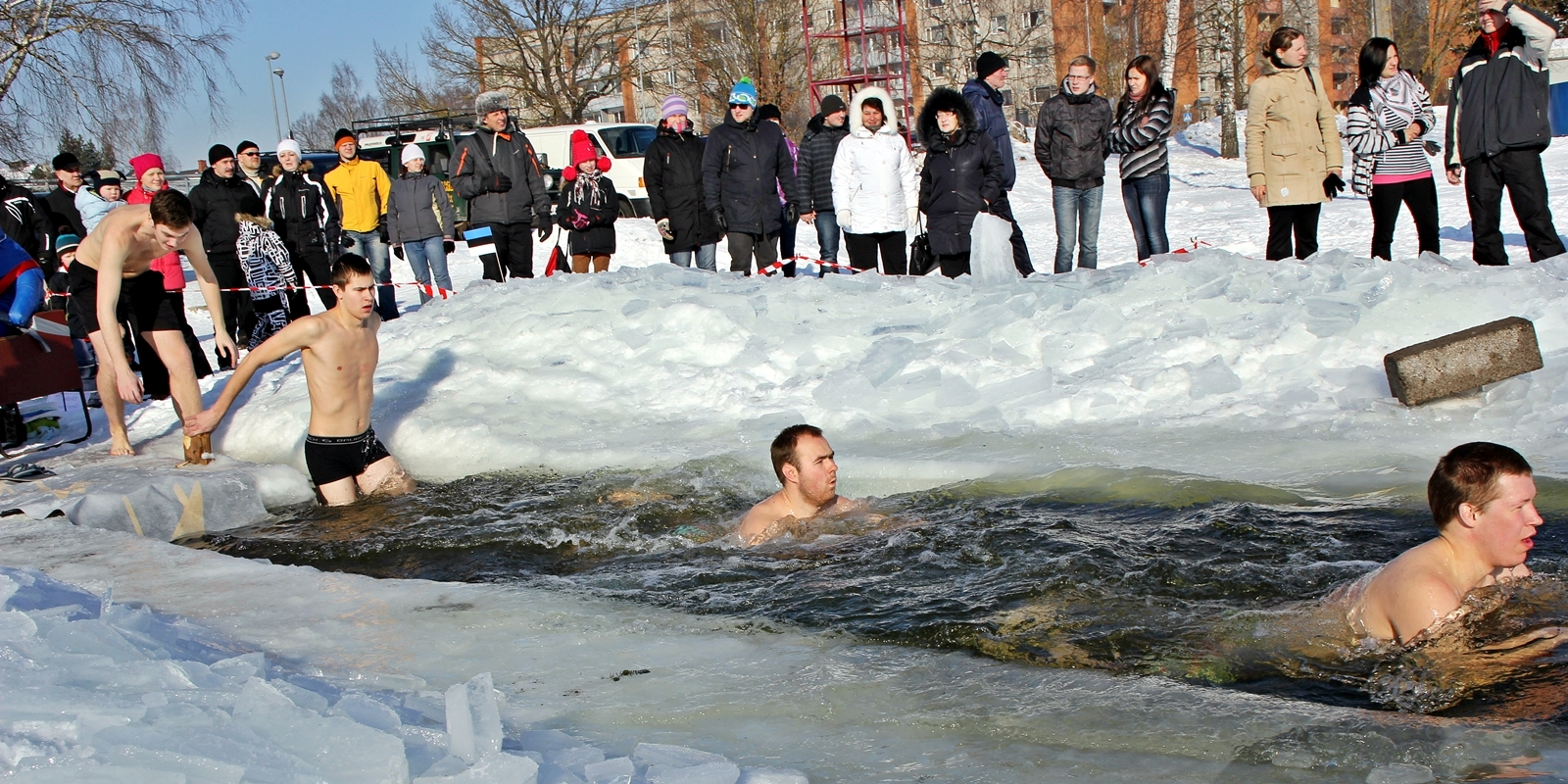 Talvine ujumine. Korraldaja - triatloni klub Trismile.